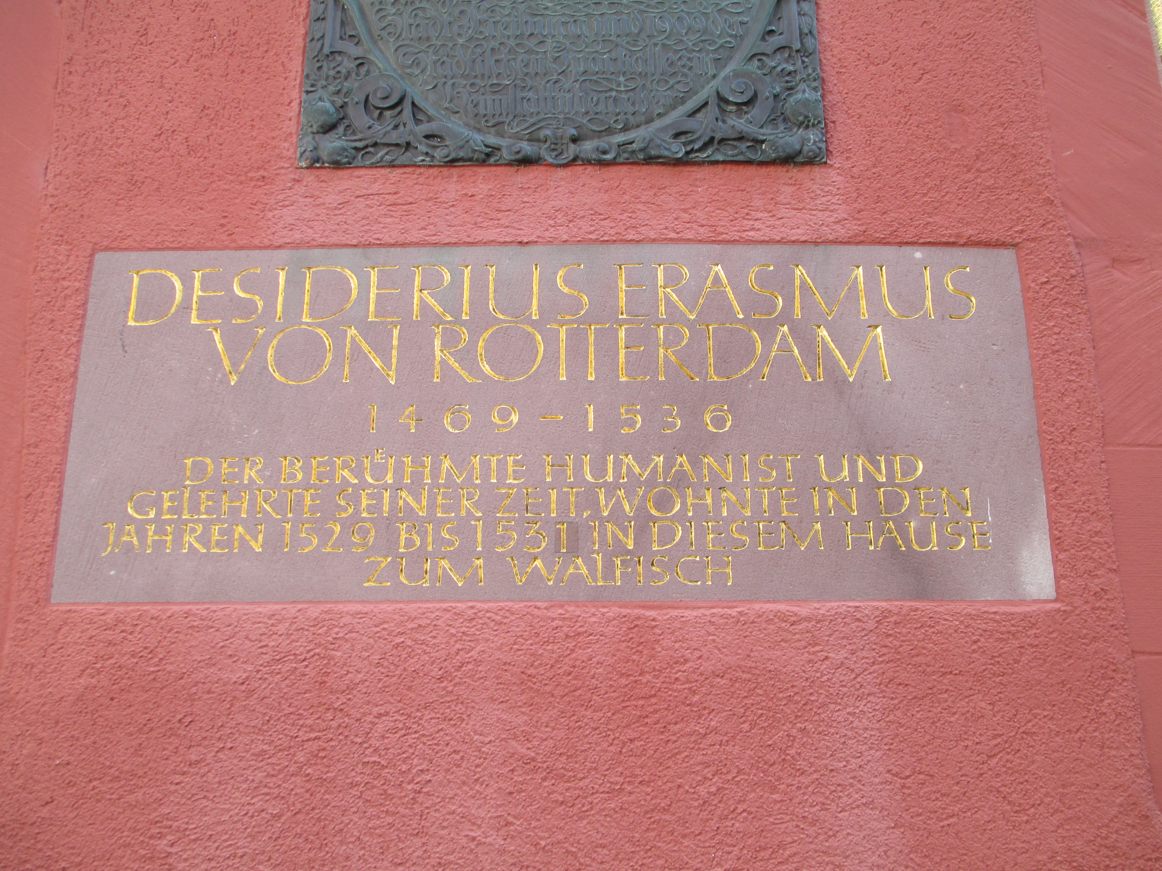 הבית בו התגורר ארסמוס מרוטרדם בפרייבורג בשנים 1529-1531